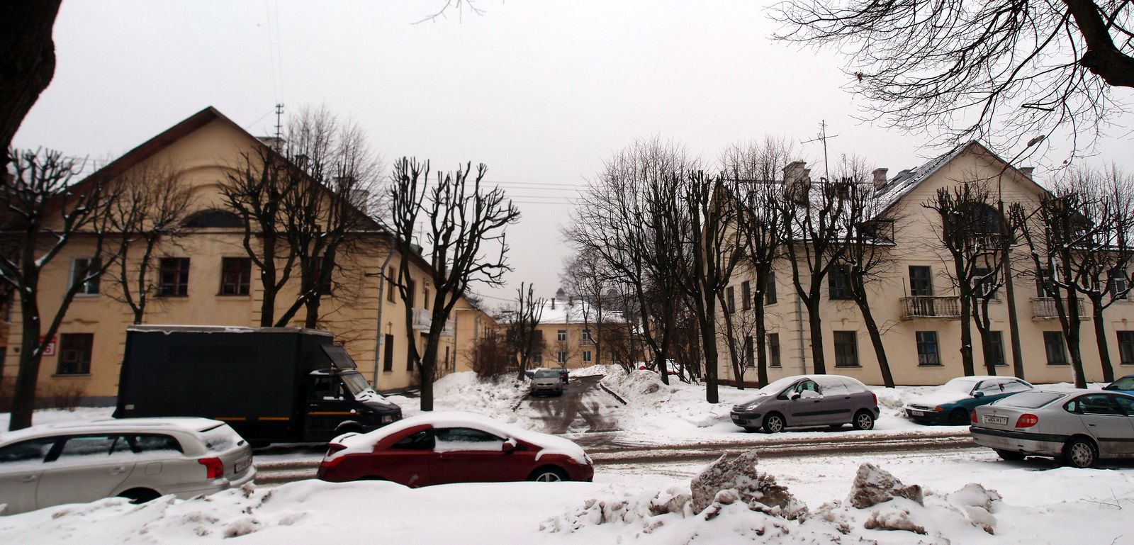 Asmaloŭka, vulica Čyčeryna